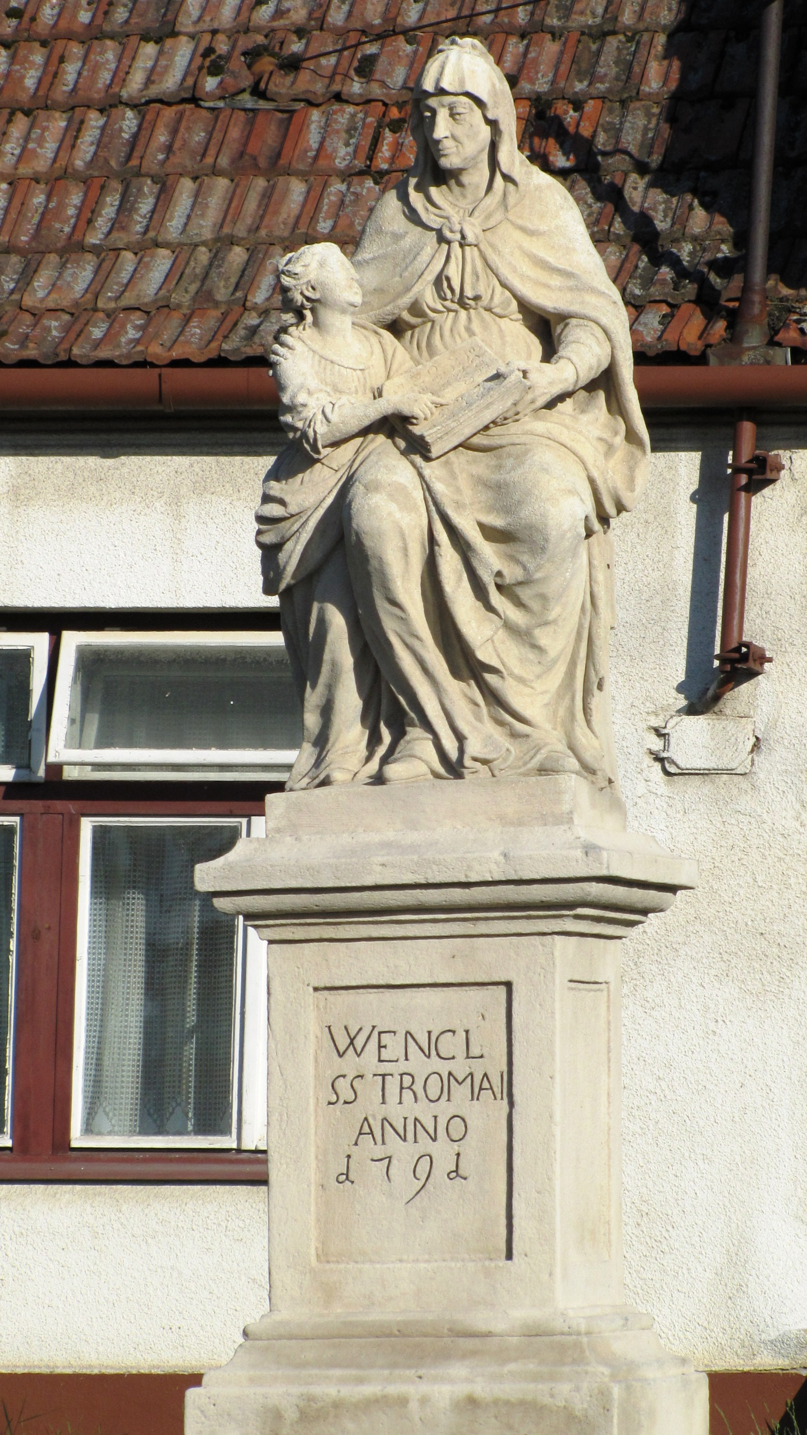 Socha svaté Anny vyučující Pannu Marii od brněnského sochaře Ondřeje Schweigla z roku 1791 (Svatobořice-Mistřín)